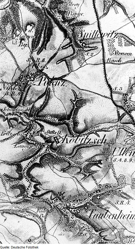 Original image description from the Deutsche Fotothek Triebischtal-Kobitzsch. Oberreit, Sect. Dresden, 1821/22